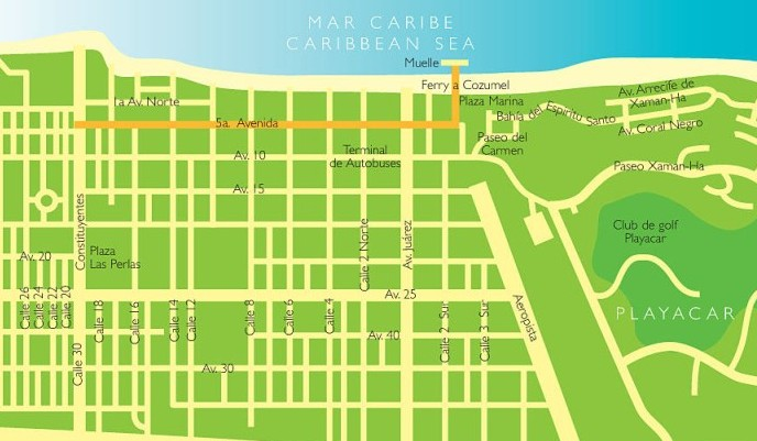 Plan Centre ville Playa del Carmen